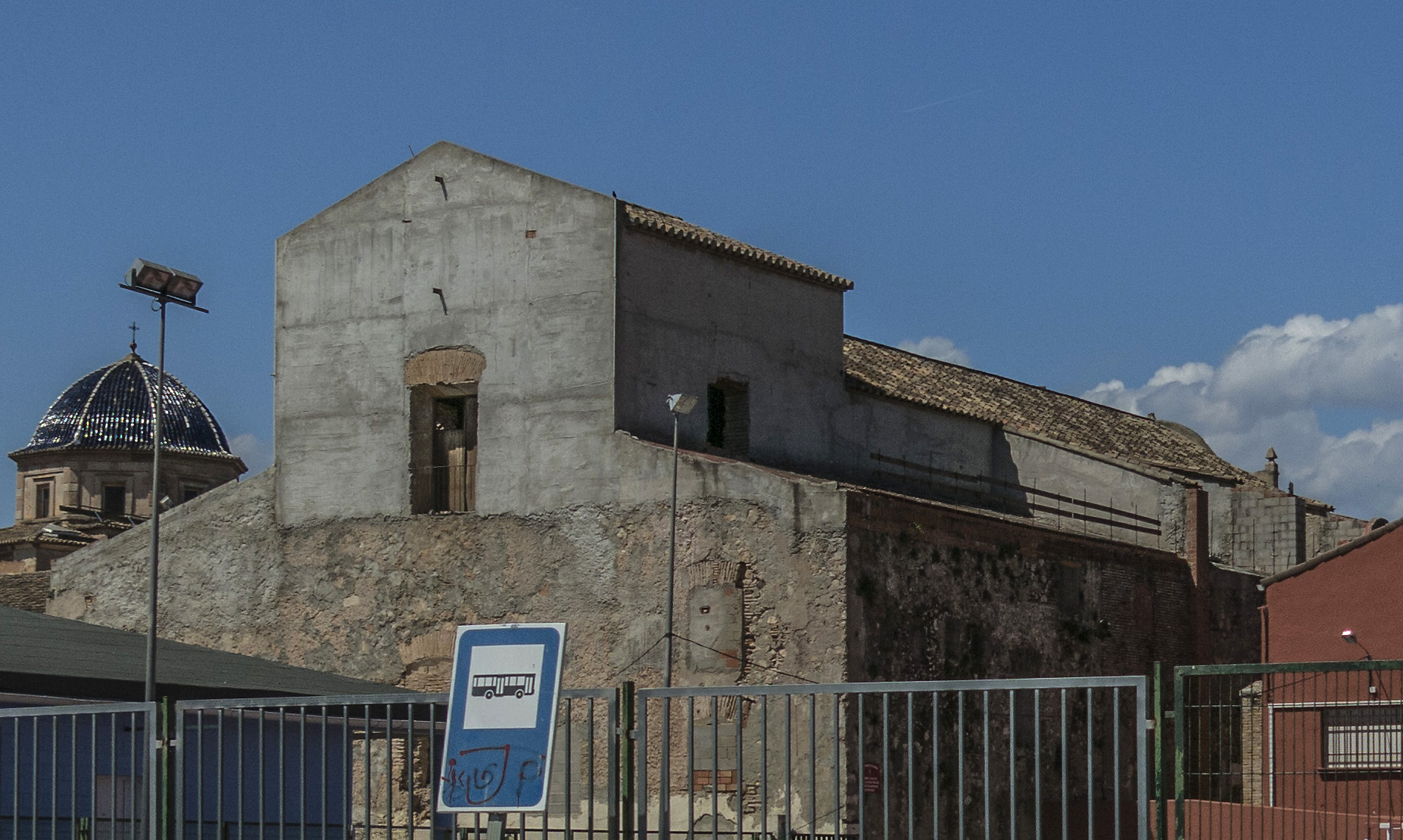 El convent de Nostra Senyora dels Àngels o Mare de Déu dels Àngels està catalogat com a Bé de Rellevància Local amb identificador número 46.20.011-006. Està situat a la plaça del Mestre Albuixech d'Alberic, a la comarca de la Ribera Alta. A la fotografia es veu la part de darrere de l'església; a la seua dreta el pati de l'escola El Convent, i a l'esquerra la cúpula de l'església de Sant Llorenç Màrtir.